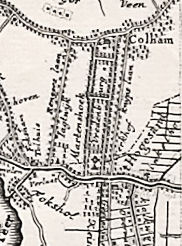 detail van de 'Borgenkaart' van Theodorus Beckeringh, met daarop het huis Vredenburg en de naastgelegen NH-begraafplaats